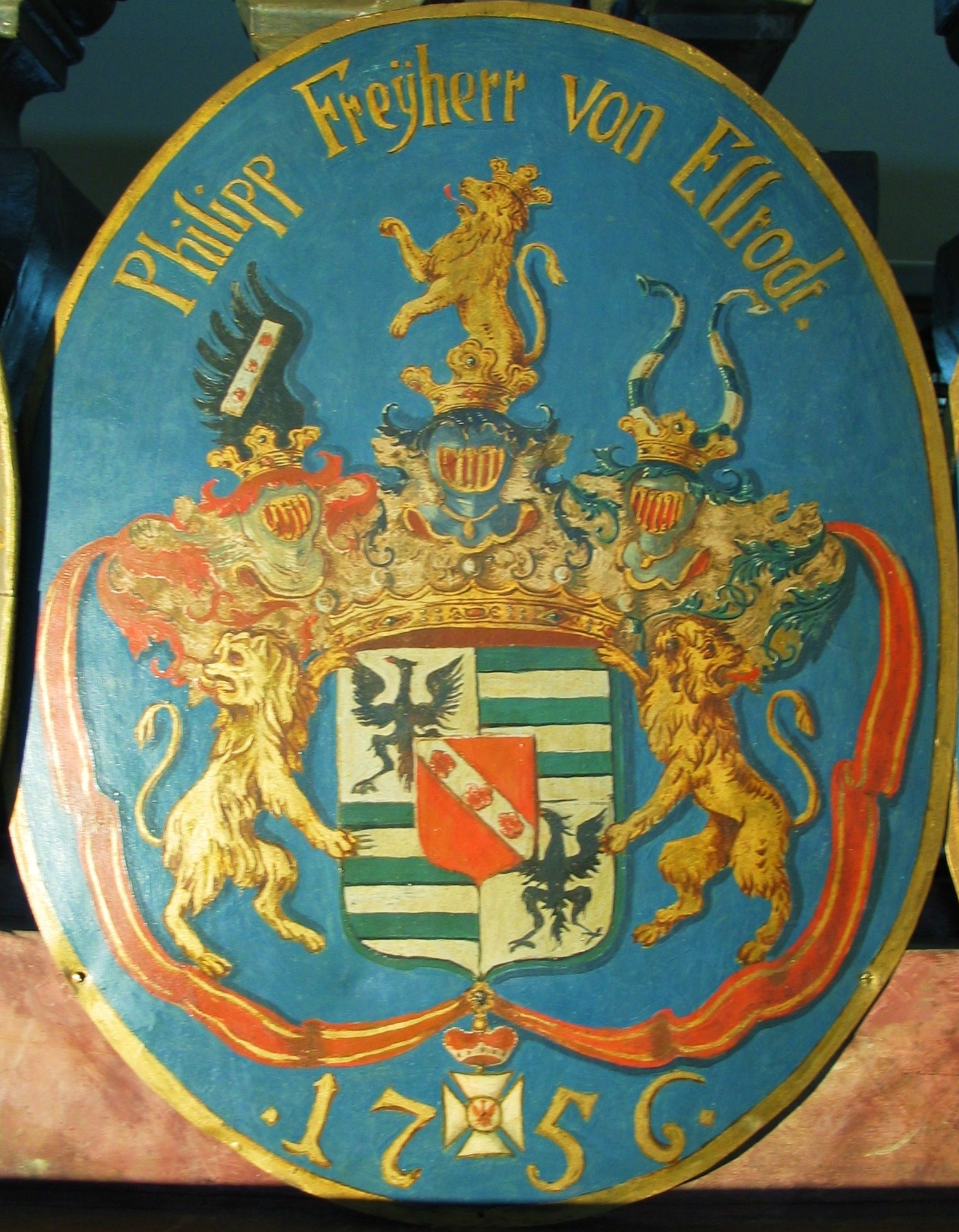 Schild des Roten Adlerordens für Philipp Andreas Ellrodt in der Ordenskirche von St. Georgen, Bayreuth